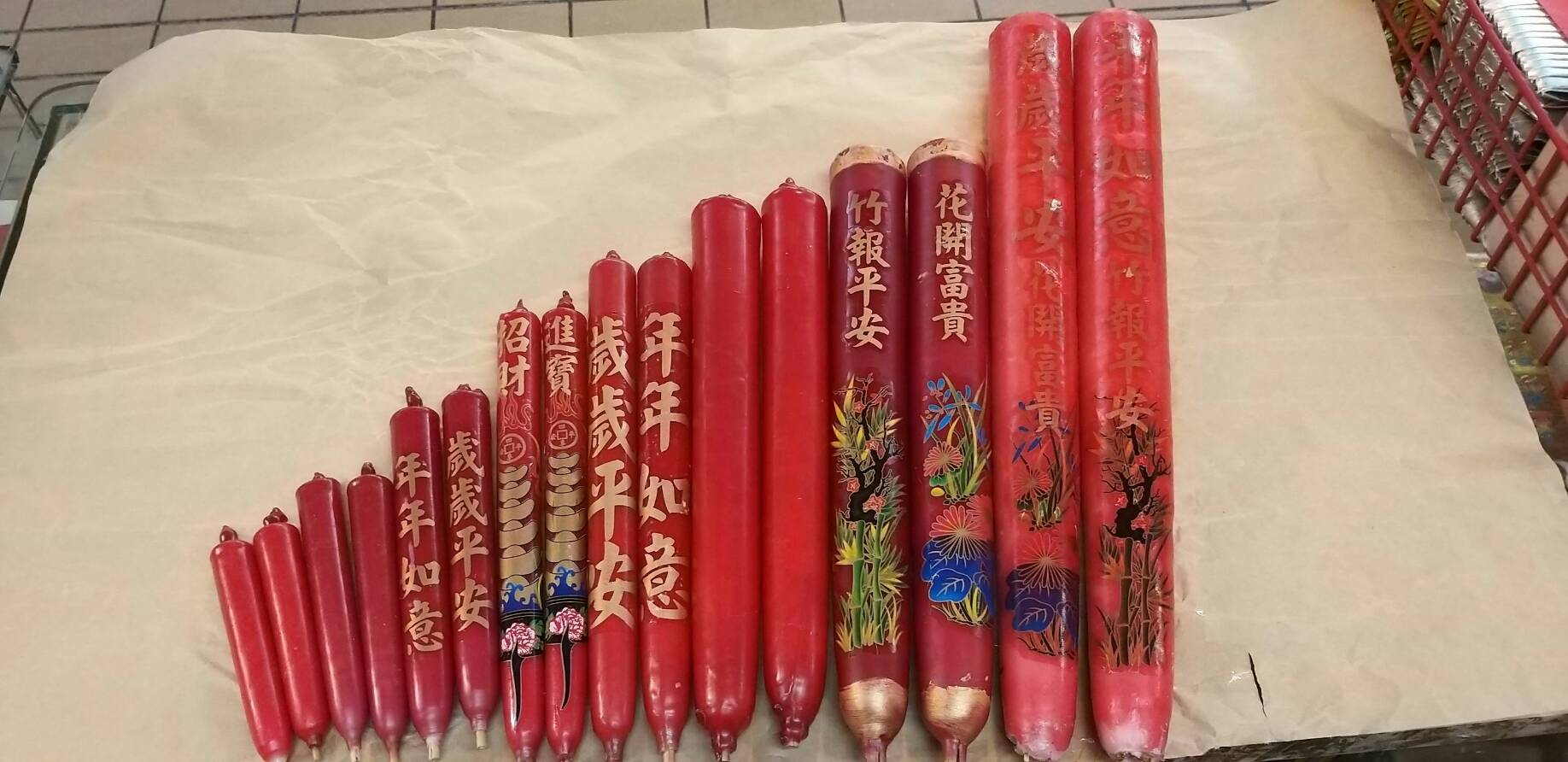 中文（台灣）: 老大生香燭號的手工傳統蠟燭，能讓人們感受火焰代來的安定感覺。